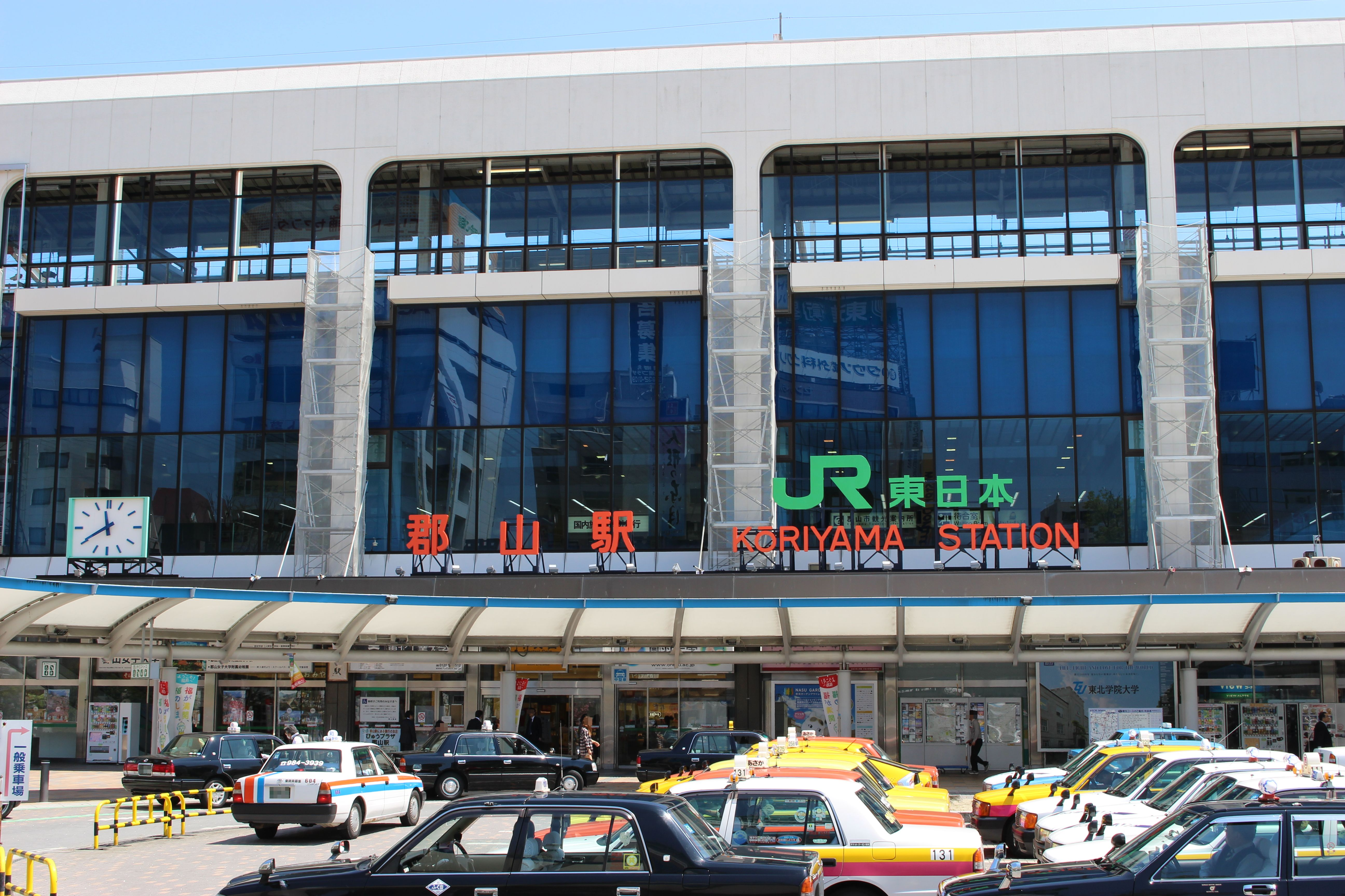 JR東日本郡山駅正面（2015年4月）